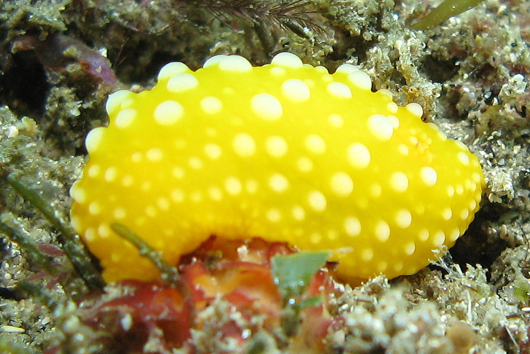 Neodoris chrysoderma